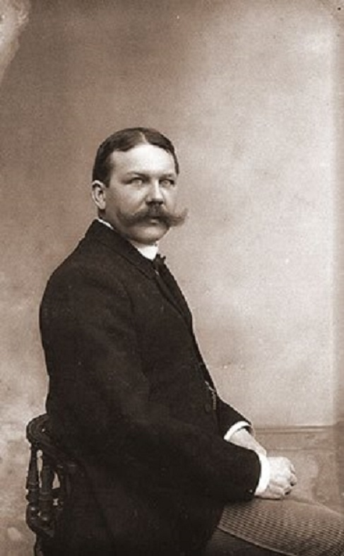 Porträt des ehemaligen Bürgermeisters der Stadt Merzig Ernst Christian Thiel